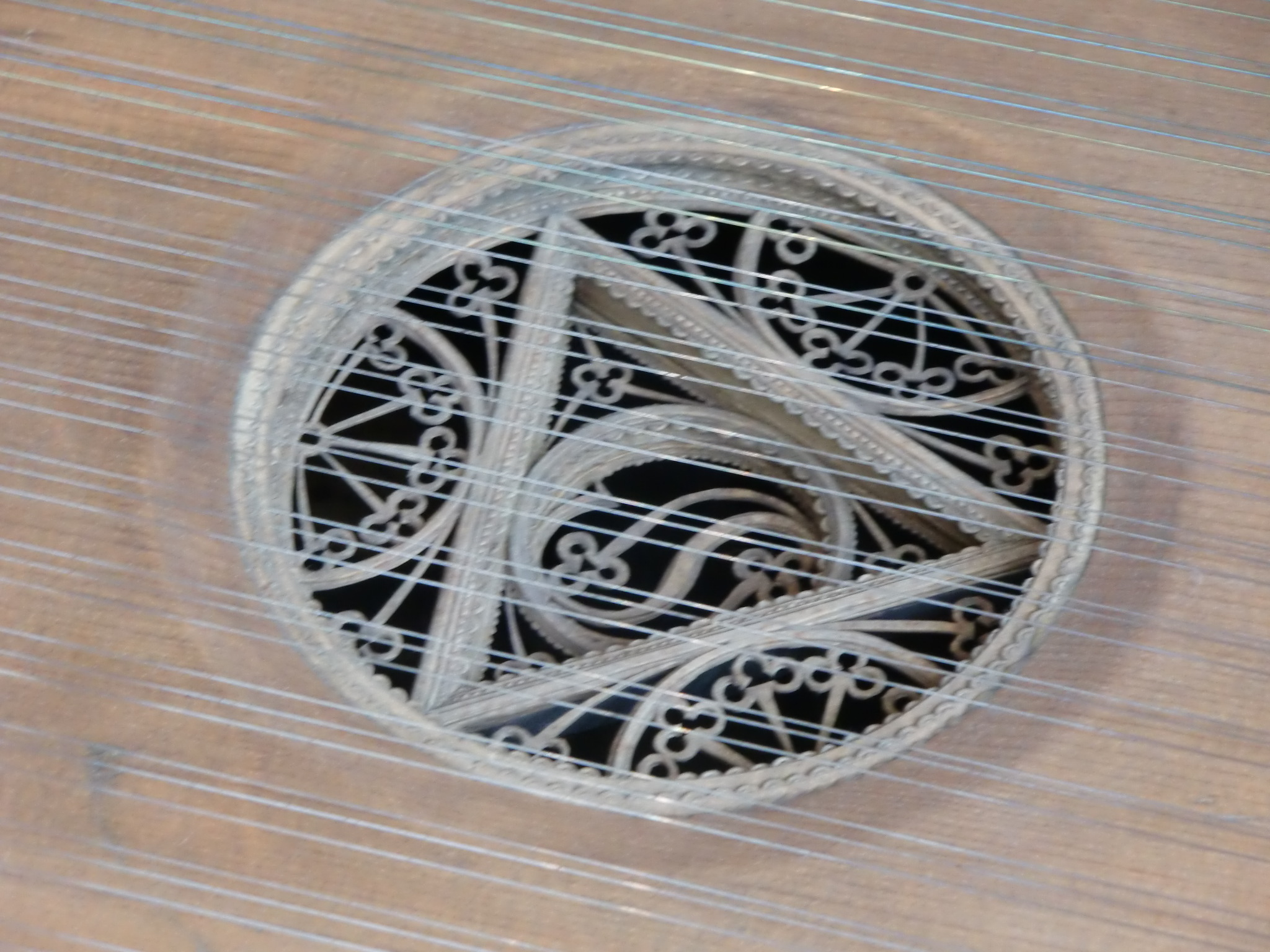 Rosace du clavecin de Gottfried Silbermann (Freiberg in Sachsen vers 1740) - Berlin, Musikinstrumentenmuseum